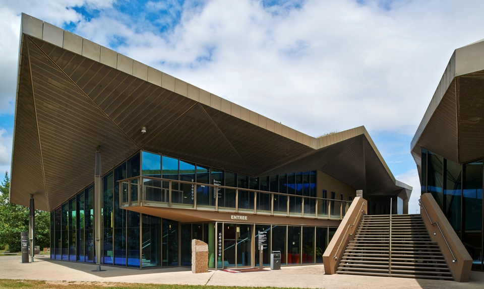 Entrée de l'Historial de la Vendée